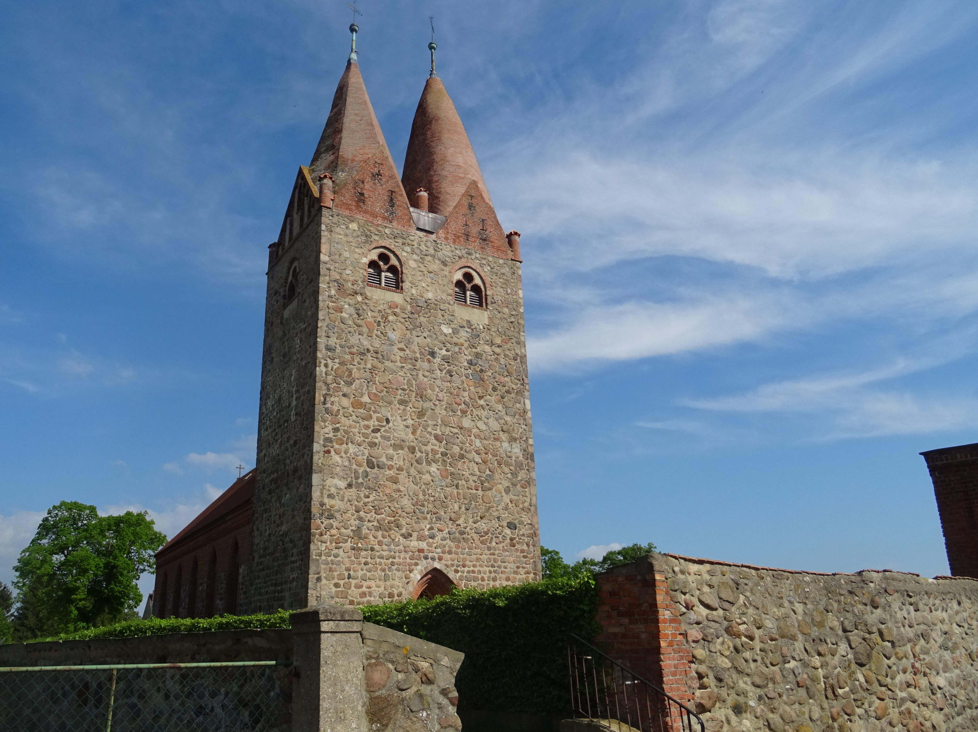 Dorfkirche Brunau, Ortsteil von Kalbe (Milde), Blick von Nordwesten